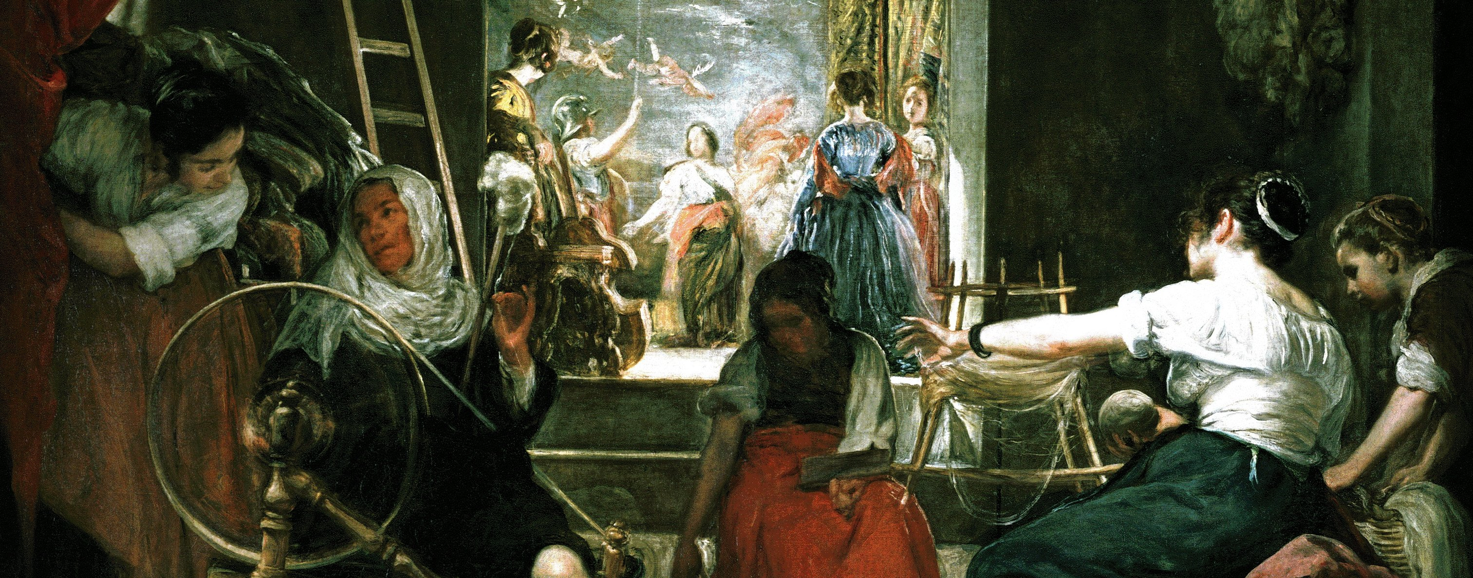 La obra representa el momento en que la tejedora Aracne fue convertida en araña por la diosa Atenea, y es una de las obras mitológicas más conocidas del pintor sevillano Diego Velázquez.